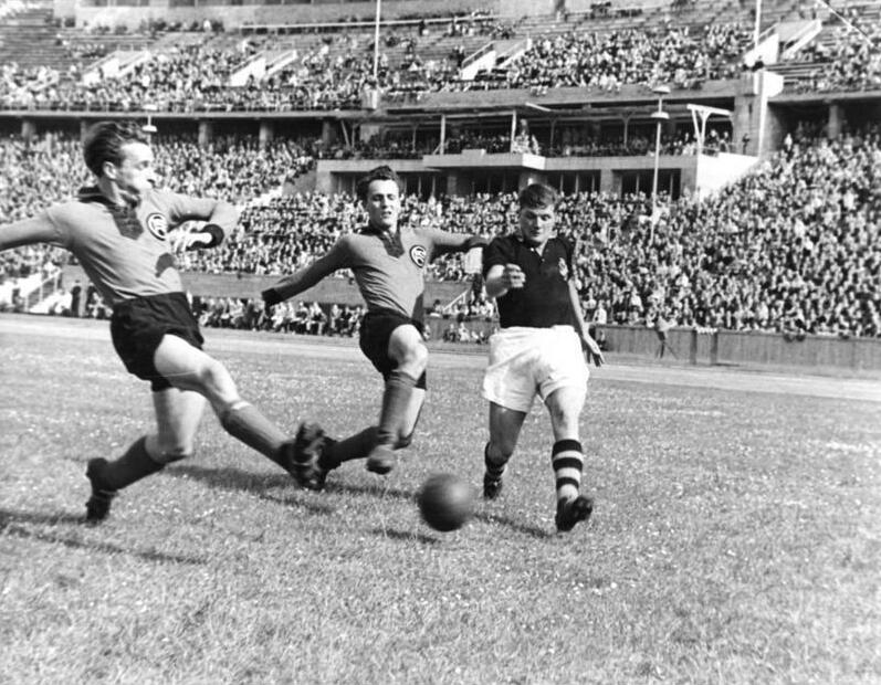 Berlin, Fußballspiel AIK Stockholm gegen BSV 92 Illus-dpd-Bratke Am 26.6.49 fand im Berliner Olympia Stadion das 1. Internationale Fussball-Freundschaftstreffen nach dem Kriege zwischen dem AIK Stockholm und dem Stadtmeister BSV 92 statt.